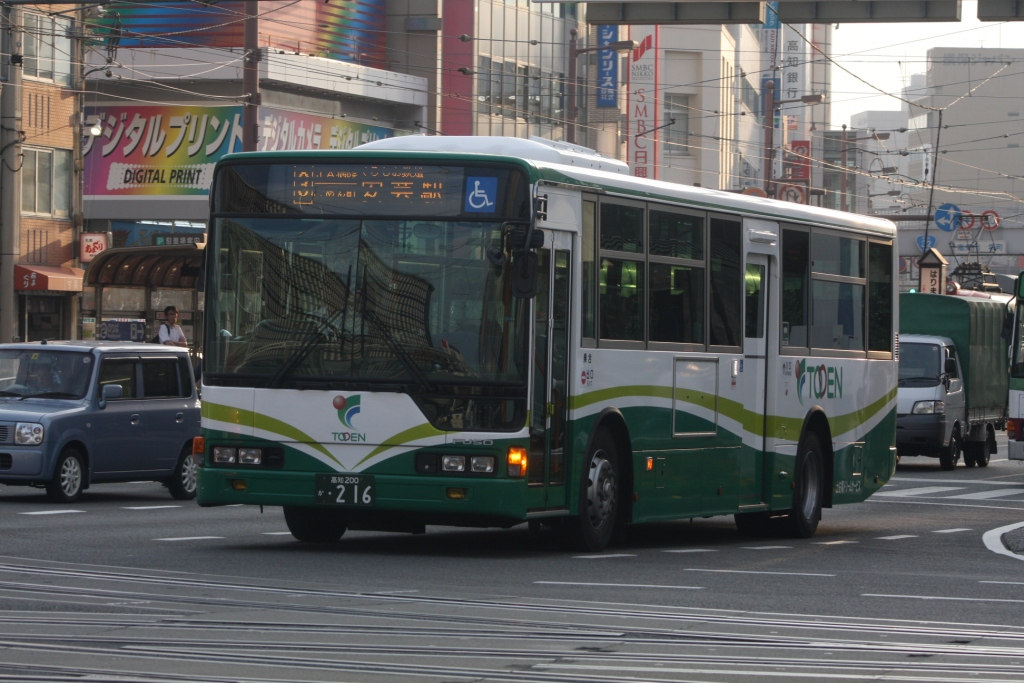 土佐電鉄新塗装の三菱ふそう・エアロスター